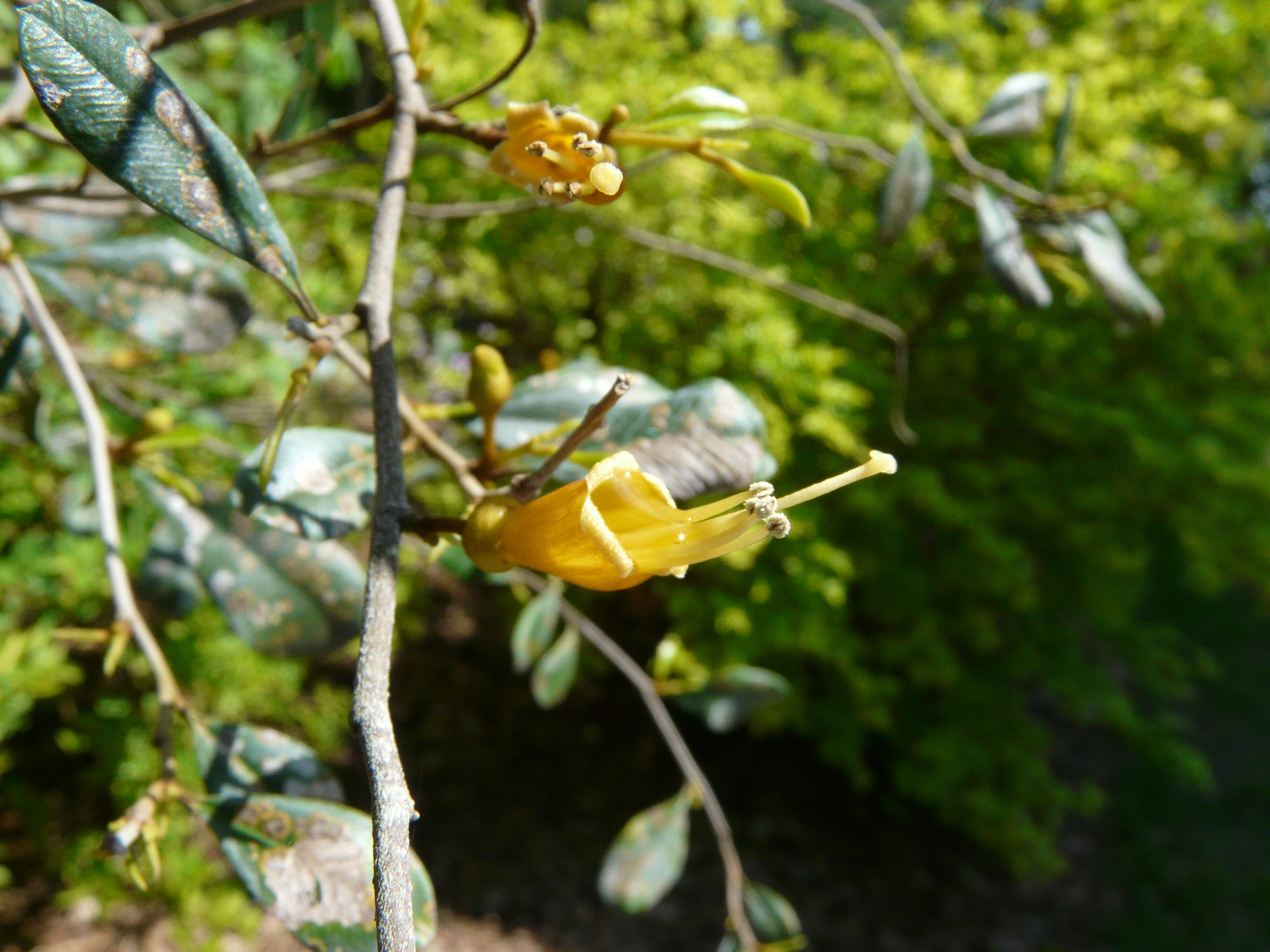 Espadaea amoena in Cuba.